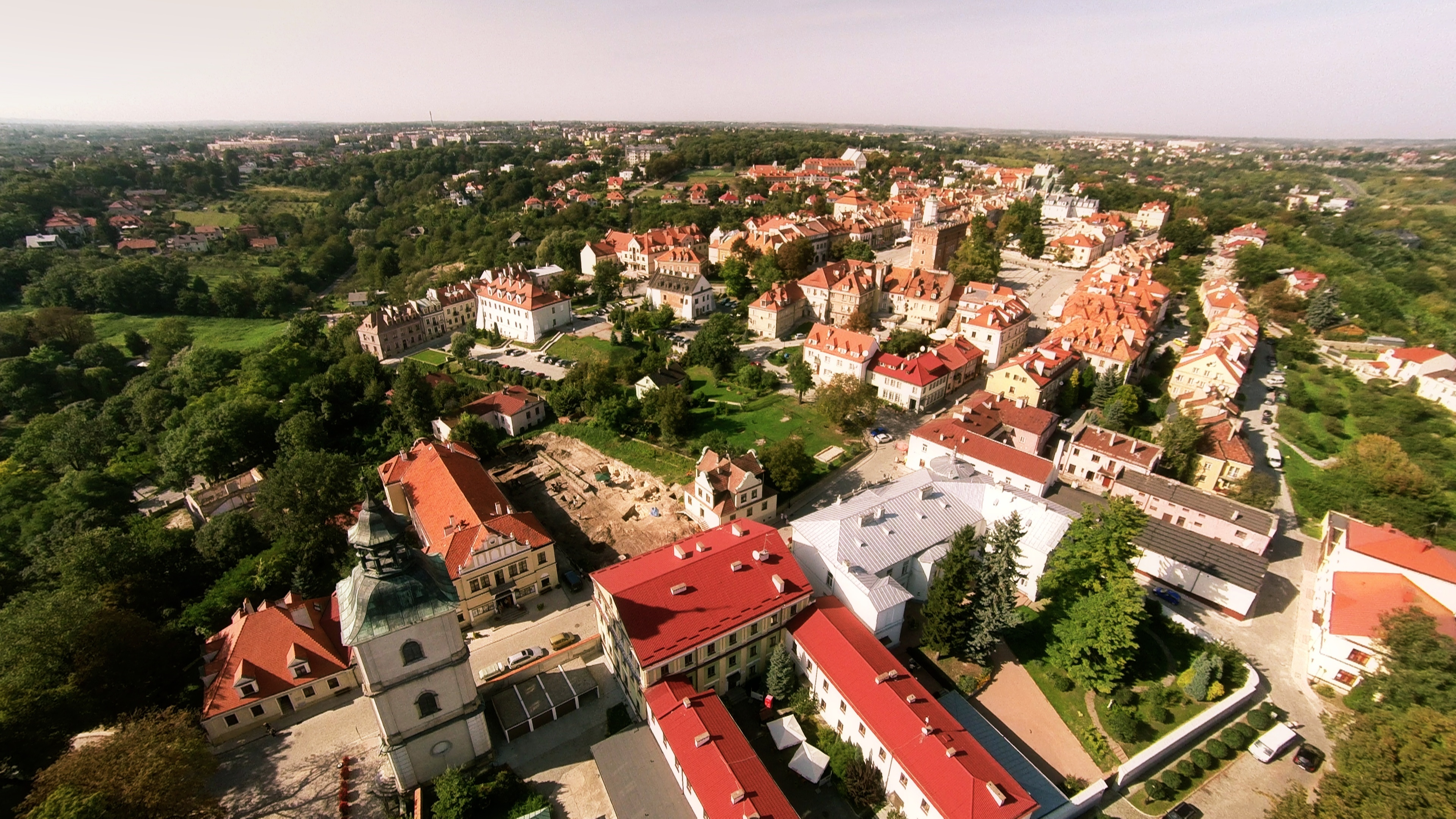 Sandomierz, zespół urbanistyczno-architektoniczny i krajobrazowy, XIII, XIX w.